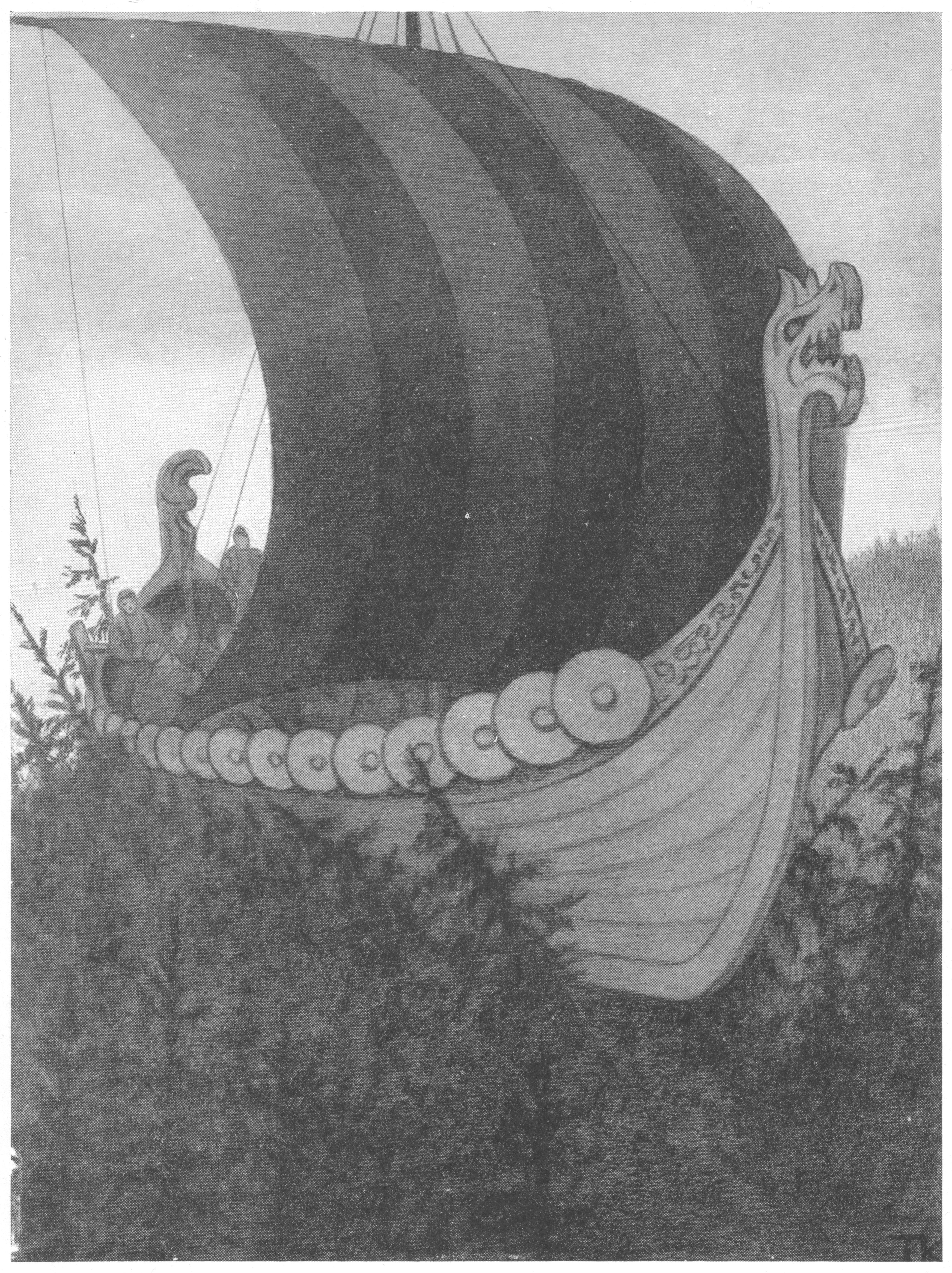 Illustrasjon til folkeeventyret Askeladden og de gode hjelperne «Skibet som gikk like godt til lands som til vanns» Scanned illustration from 1936 edition of Asbjørnsen & Moe: Samlede eventyr. Norske kunstneres billedutgave. Gyldendal Norsk forlag.